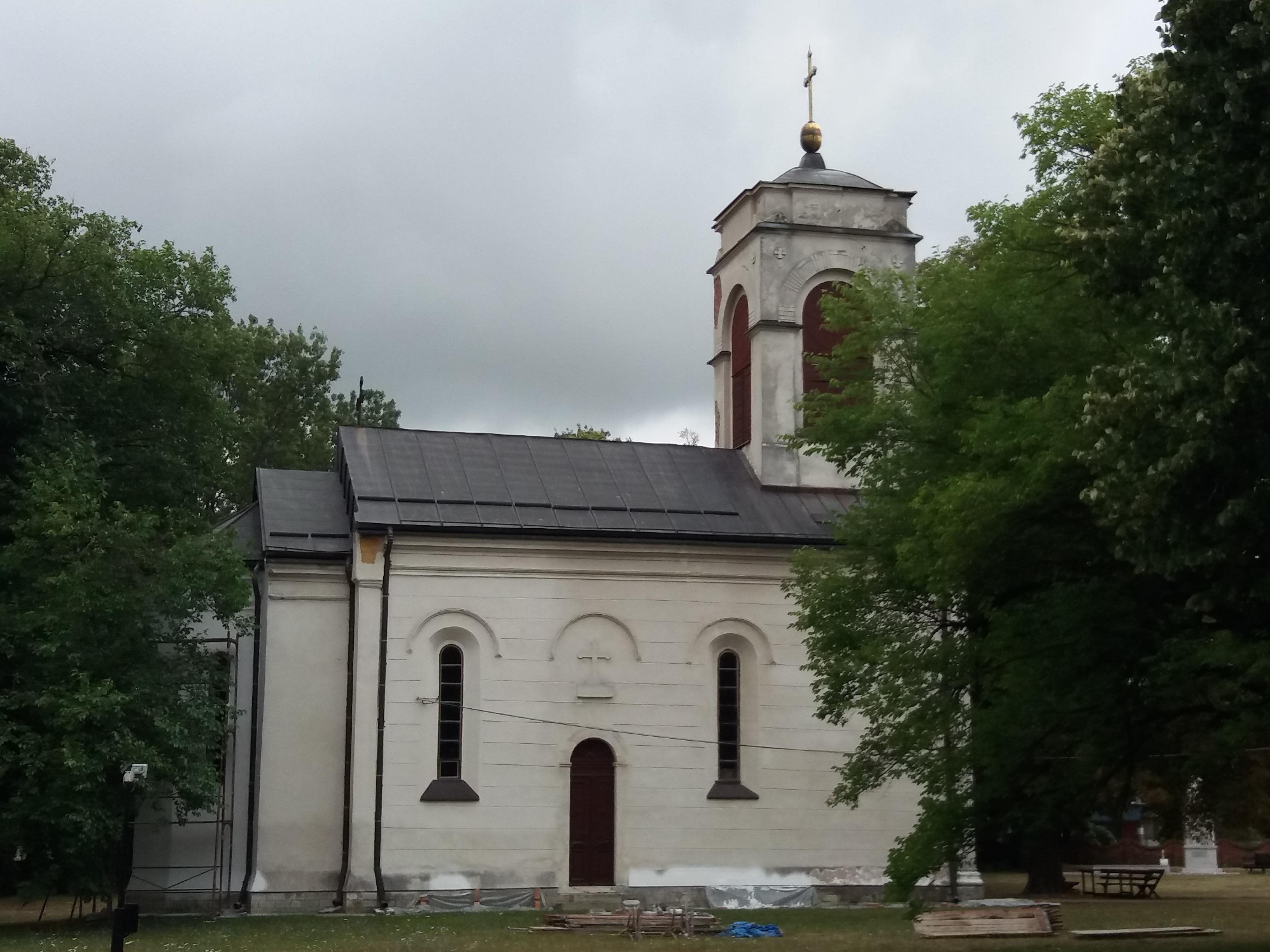 Srpski (latinica): Crkva Svetog Vaznesenja, Golobok